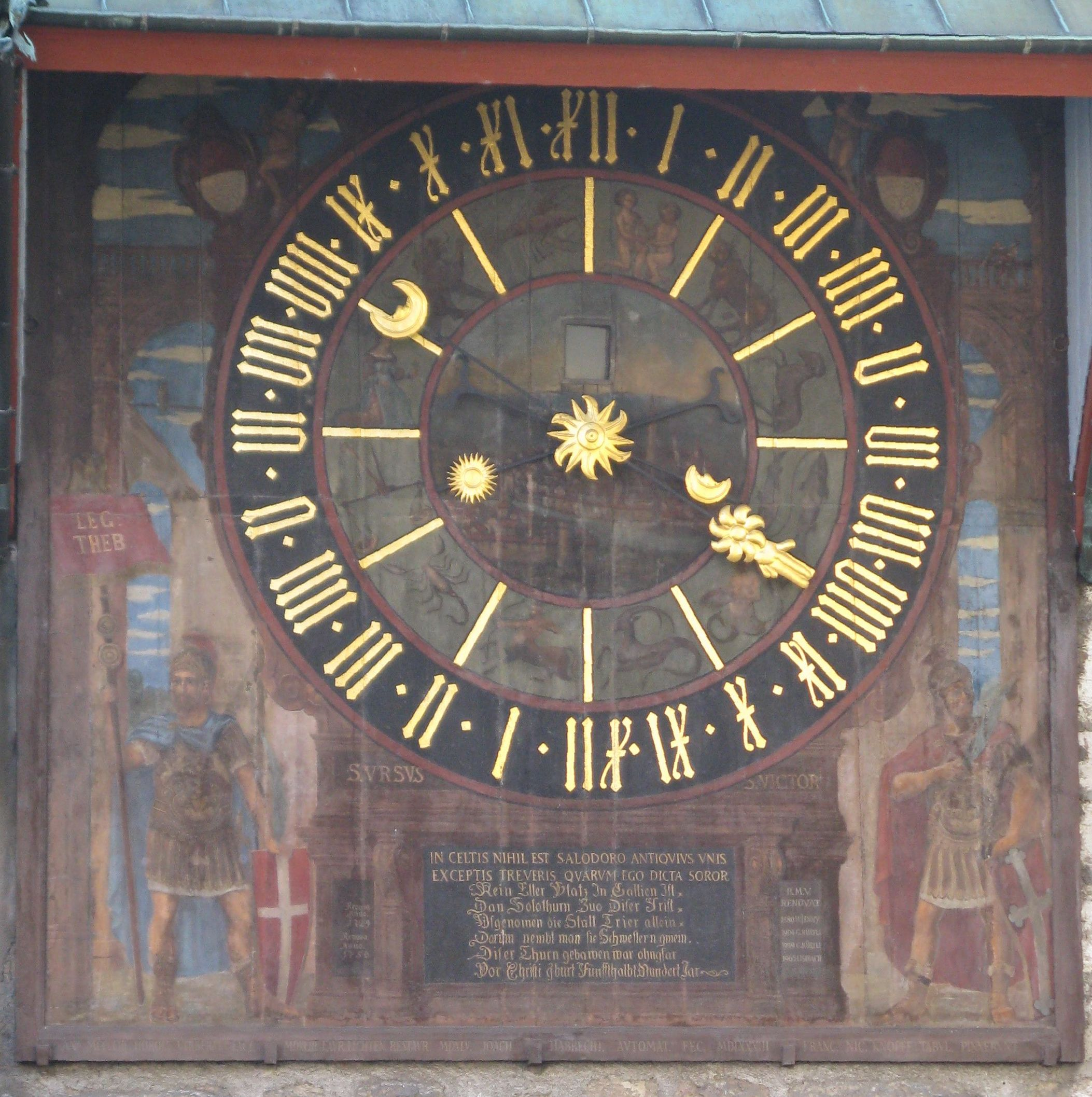 Astronomische Uhr am Roten Turm in Solothurn: Tierkreisuhr